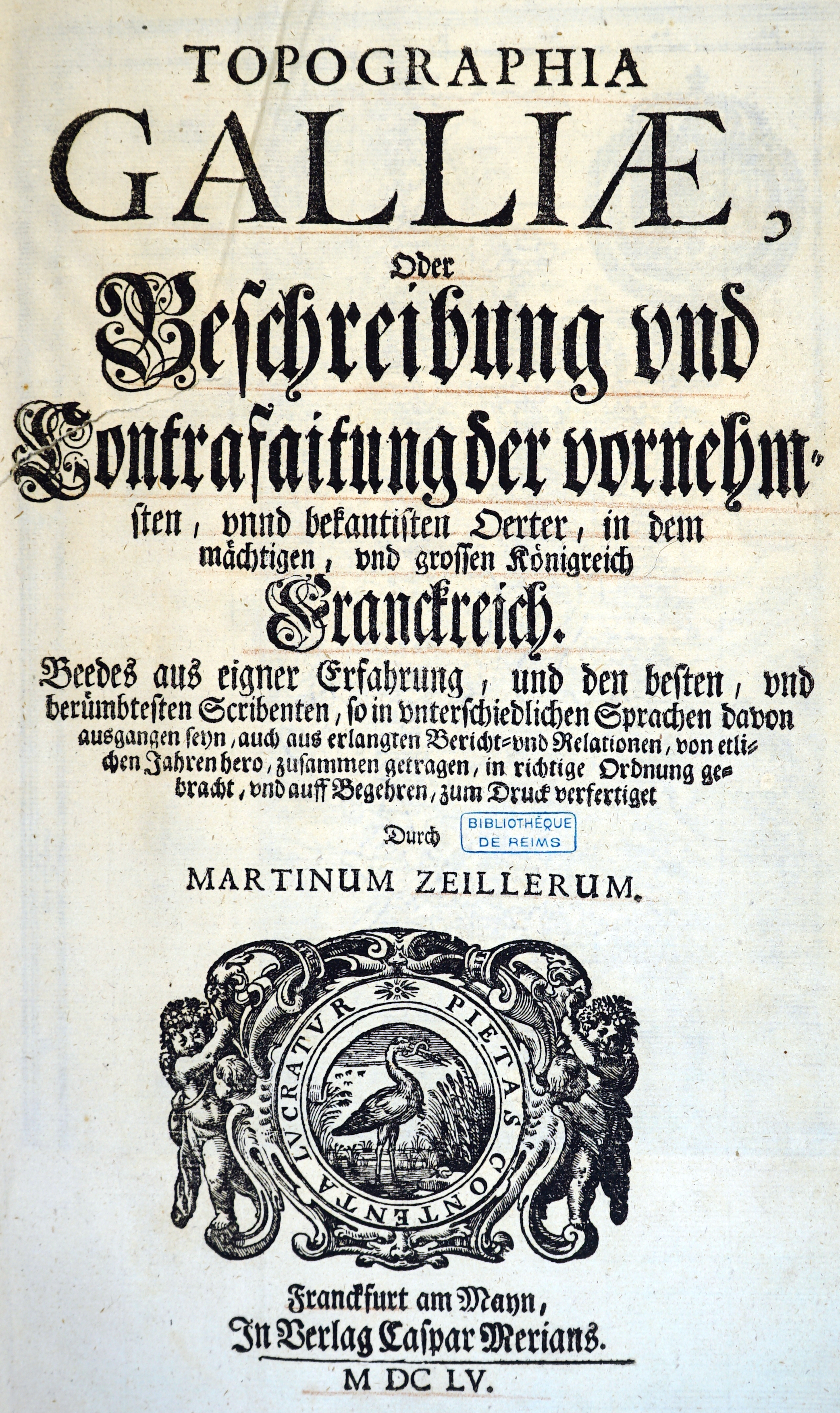 détail du livre topographia Galiae.